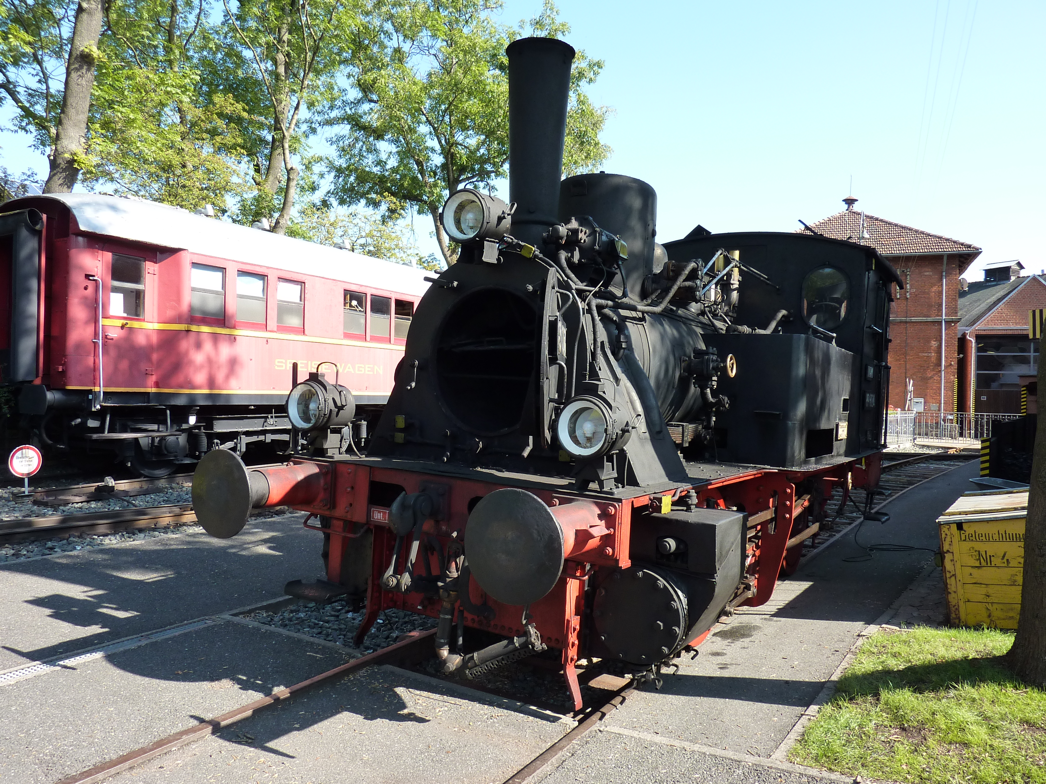 Güterzug-Tenderlokomotive 89 6024 (Typ Bismarck – ähnlich preuß. T 3) Baujahr: 1914 Hersteller: Henschel & Sohn, Cassel Fabr.-Nr.: 13025